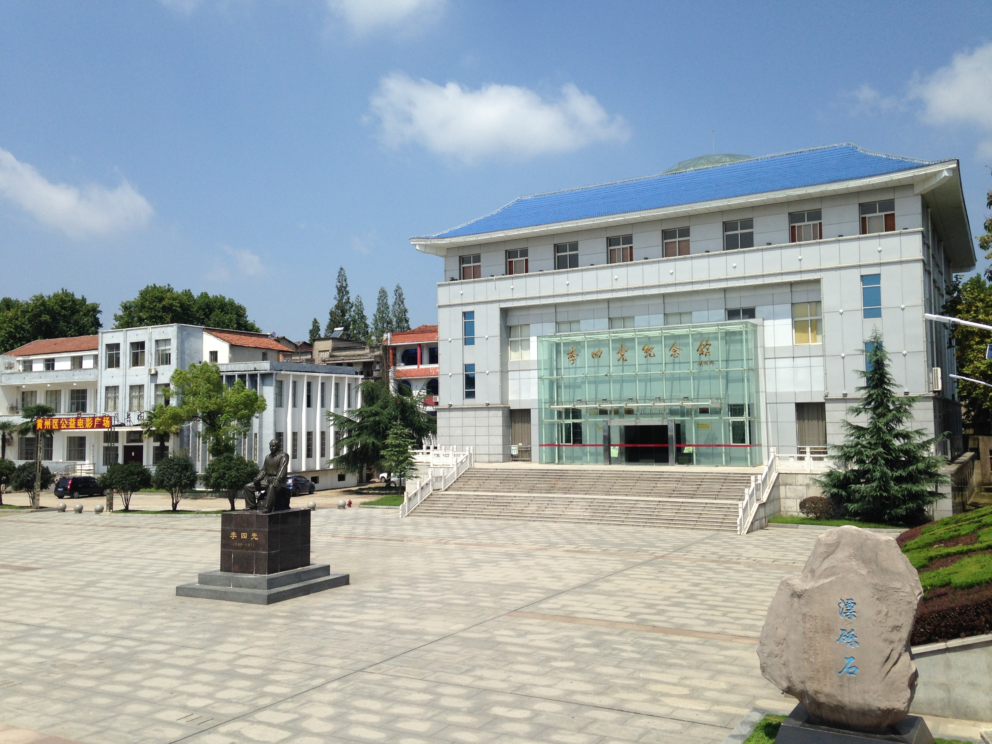 李四光記念館